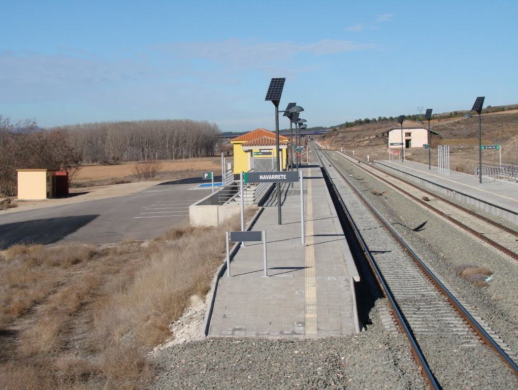 Vista general de la renovada estación de Navarrete (Teruel). Al fondo, a la derecha puede verse el antiguo almacén, ya sin uso y fuera del tendido, único vestigio de la vieja estación